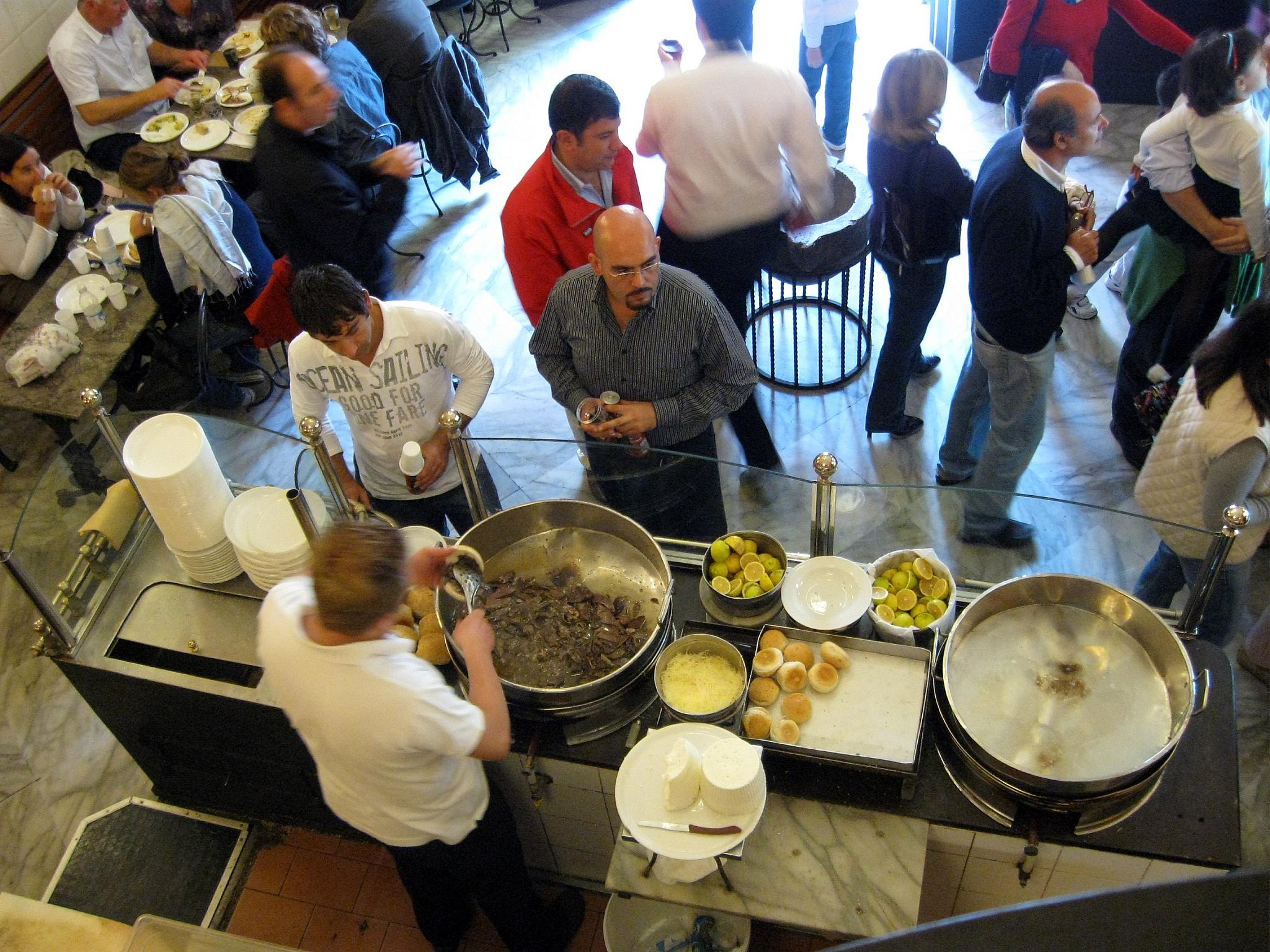 Antica focacceria San Francesco Nel cuor del centro storico di Palermo, laddove sorgeva la Cappella del settecentesco palazzo dei Principi di Cattolica, nacque la "focacceria San Francesco". Era il 1834. Il fondatore Antonio Alaimo, di professione cuoco di palazzo, ebbe come saldo delle sue spettanze i locali dell'ex cappella, dove ancora oggi è attiva la focacceria. La stessa si affermò già dal 1834, come il primo locale pubblico dove poter consumare piatti tipicamente palermitani: lo sfincione, la focaccia schietta e quella maritata. Via Alessandro Paternostro, 58 - Palermo